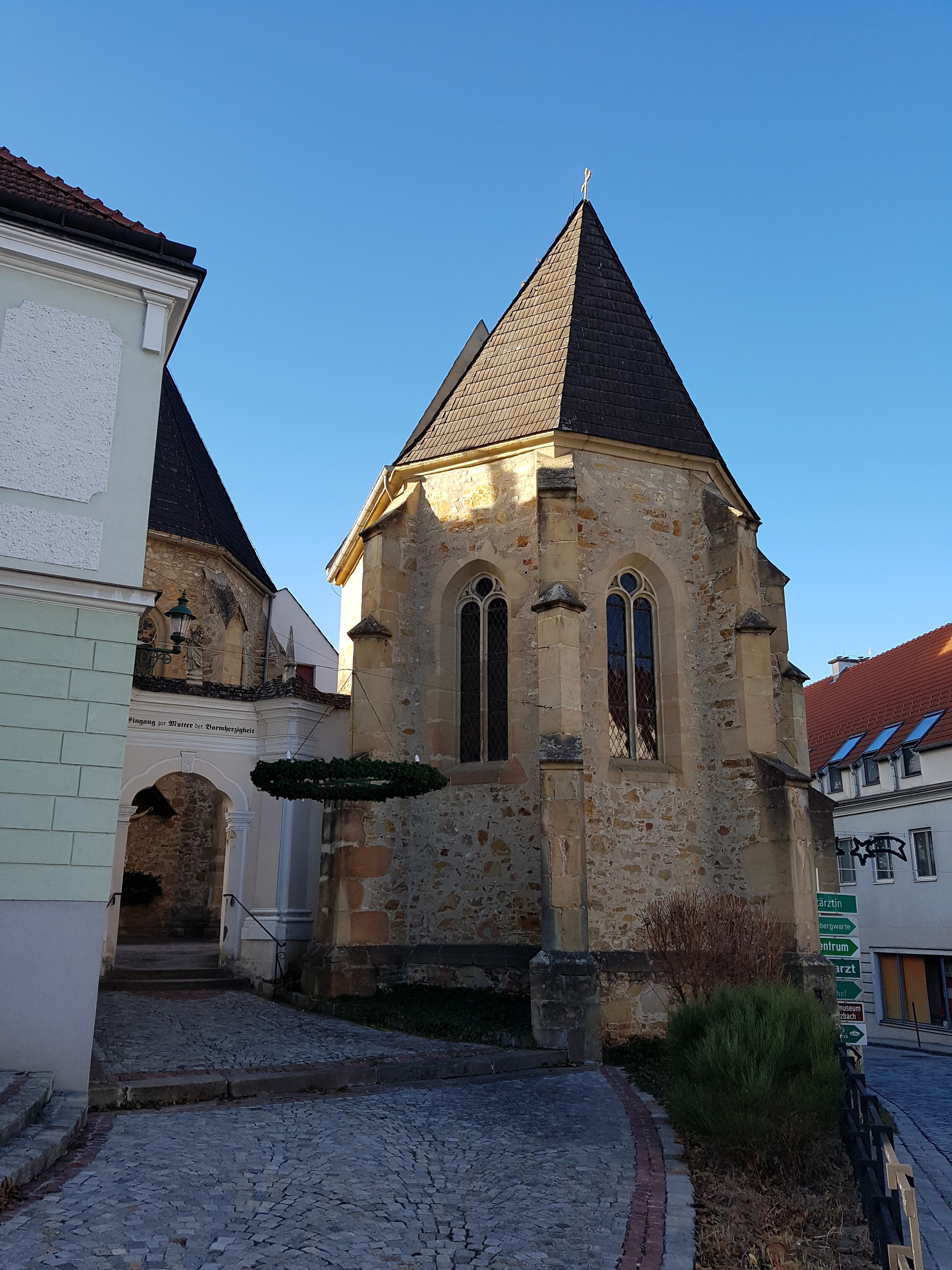 Martinikapelle östlich der Kirche vom Maria-Anzbach im Jahre 2018